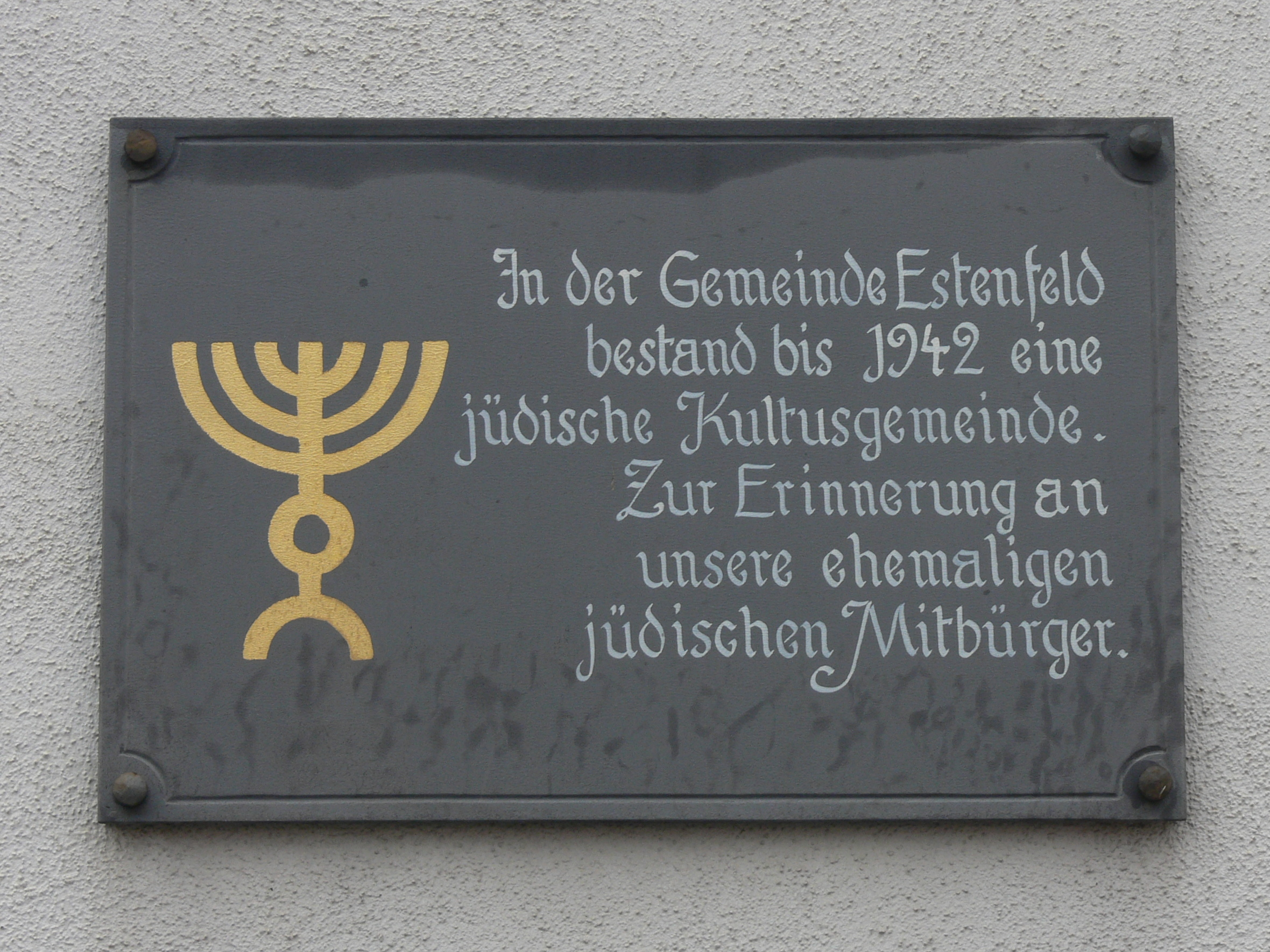 Gedenktafel an die Jüdische Kultusgemeinde Estenfeld angebracht am Nebengebäude der Gemeindeverwaltung Estenfeld, Untere Ritterstraße 6, Estenfeld, Unterfranken, Bayern, Deutschland